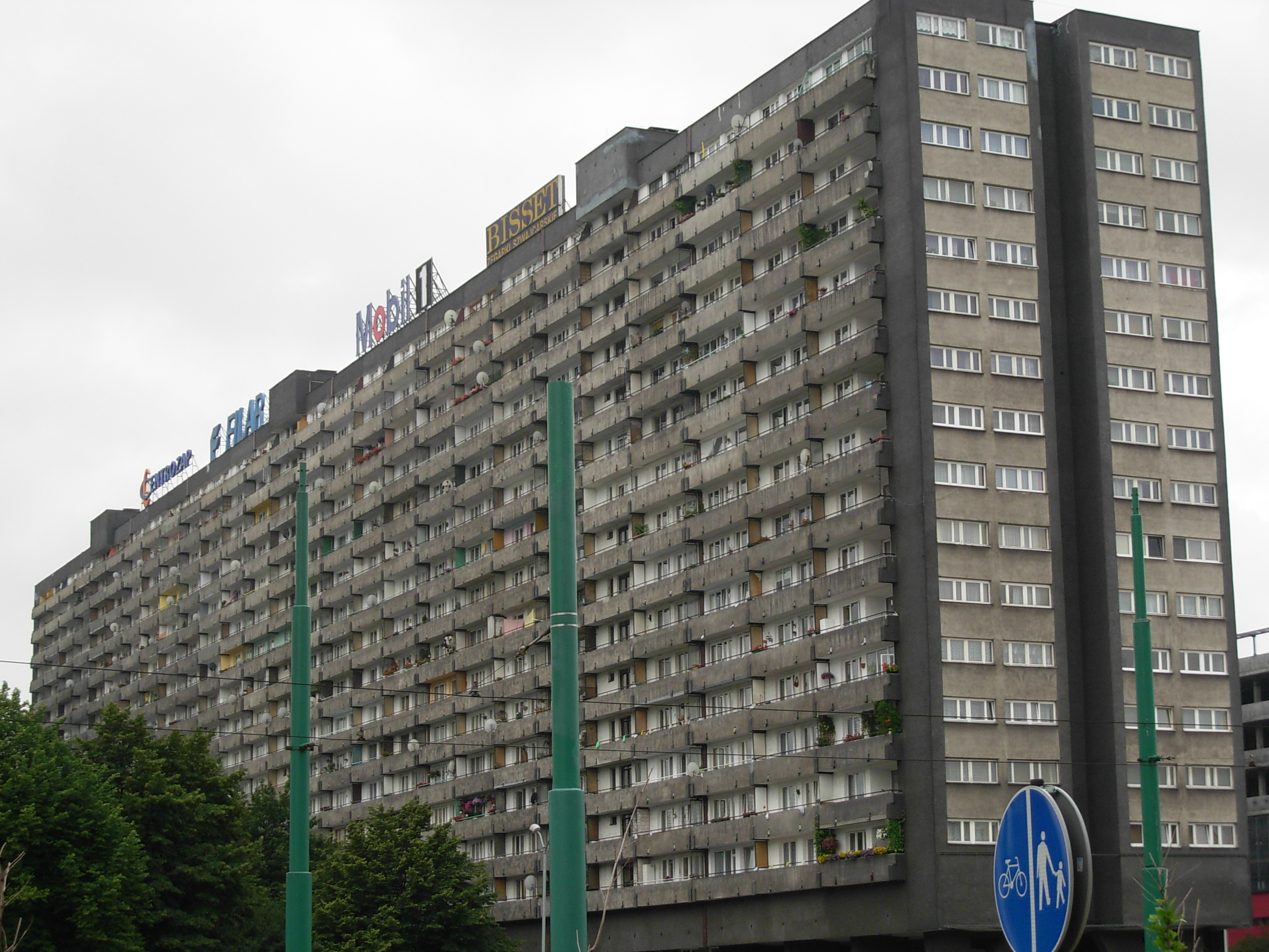 Katowice